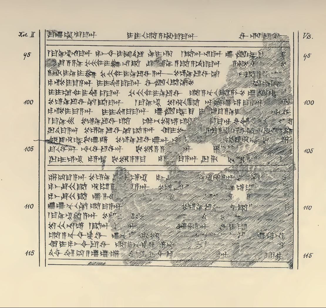 List Tuszratty do Amenhotepa III w języku huryckim – autografia.